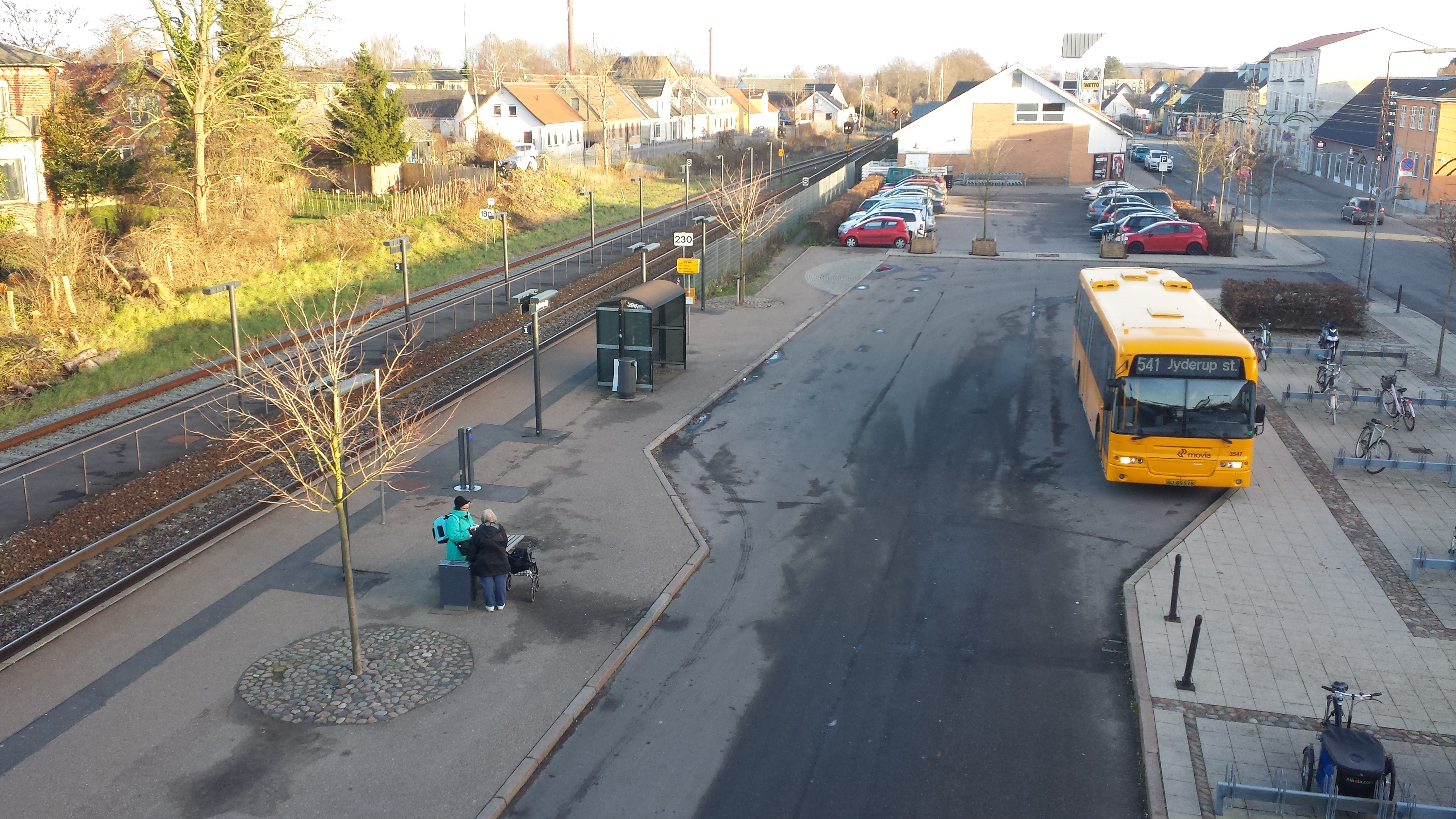 Tog- og busstation